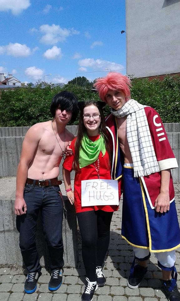 Konwent fanów mangi i anime Animatsuri zorganizowany w dniach 11-13 lipca 2014 roku w XCIV Liceum Ogólnokształcącym im. gen. Stanisława Maczka w Warszawie.